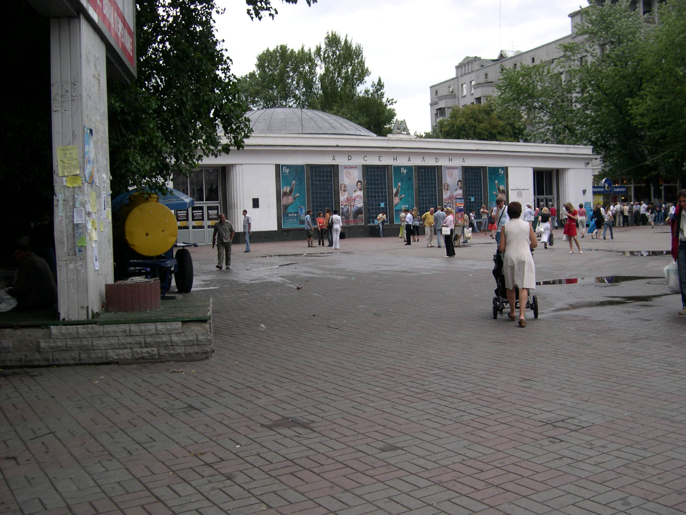 Arsenalnaya vestibule 2007